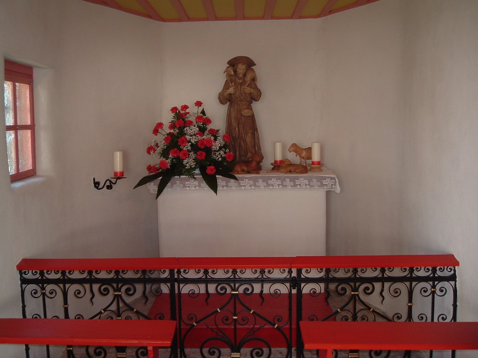 Wendelinuskapelle in Dietesheim -Innenansicht